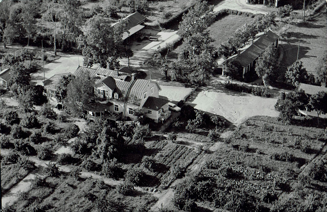 Yleiskuva